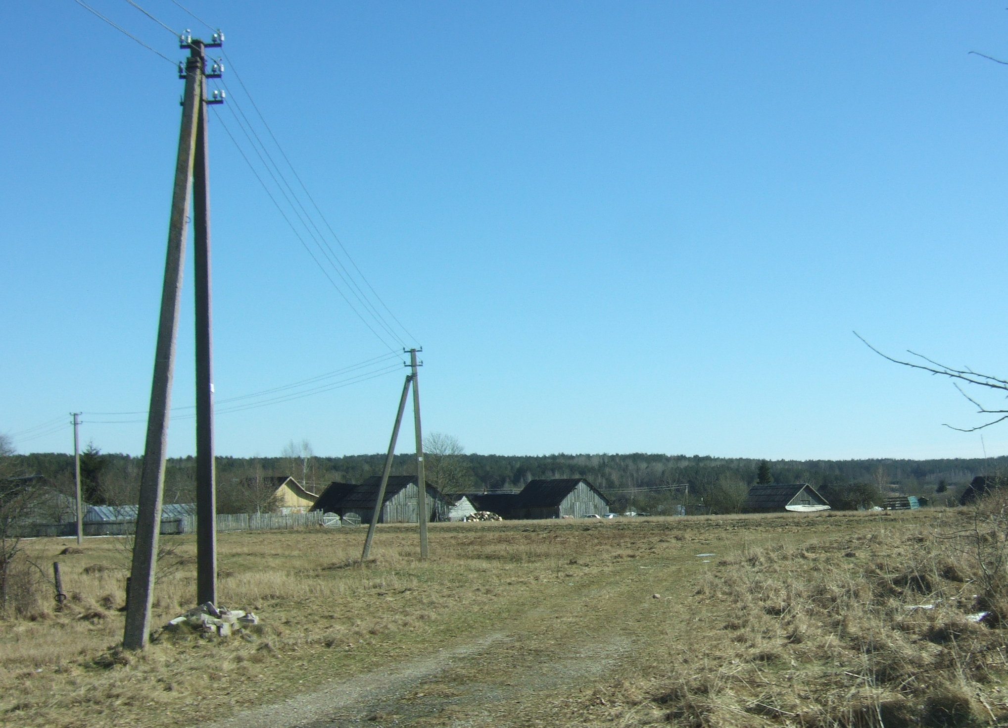 Lastaučikų kaimas